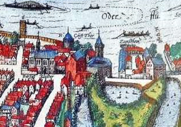 Fragment Alten Stettin-4